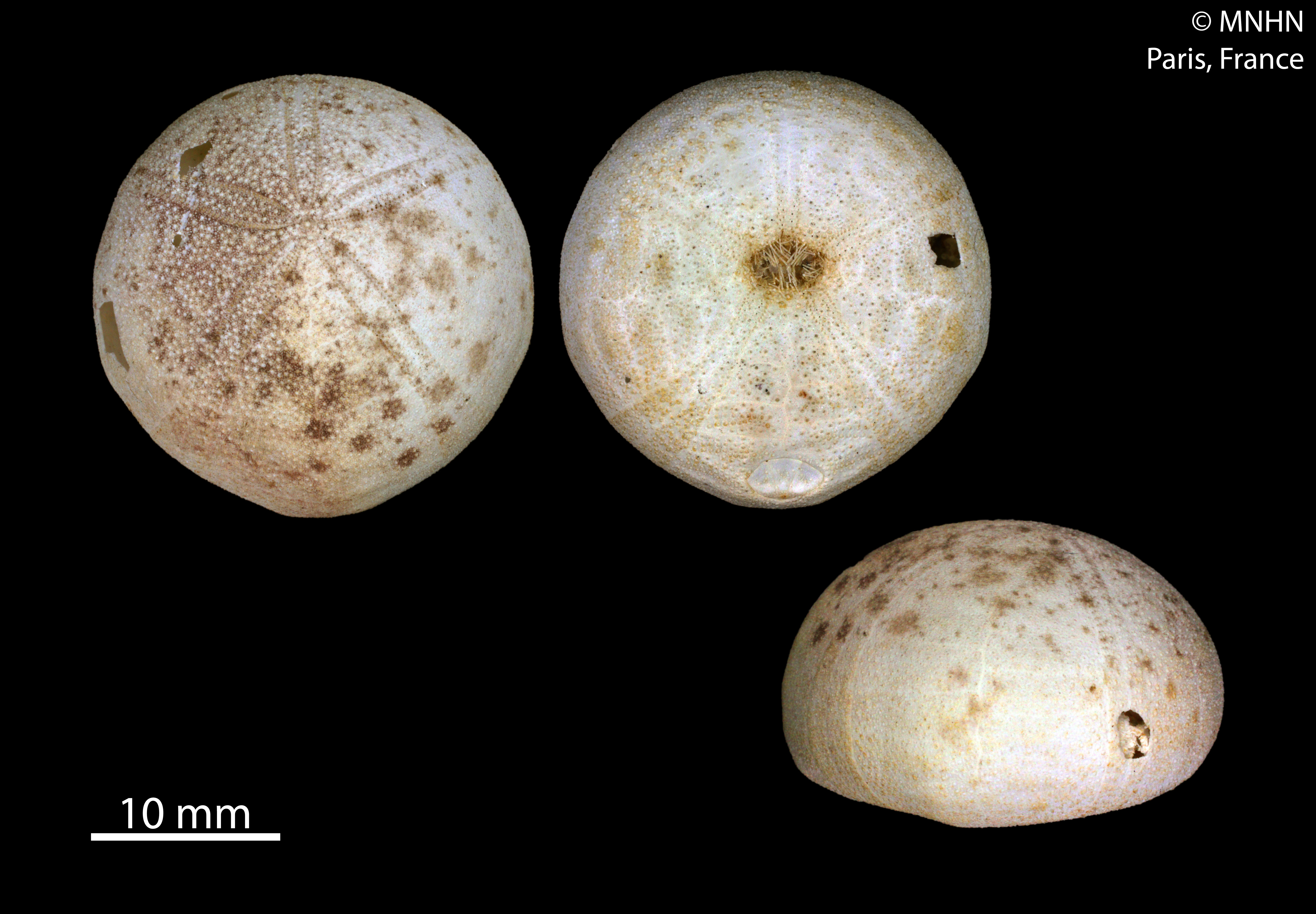 Echinolampas depressa, collection du Muséum National d'Histoire Naturelle (Paris, France).